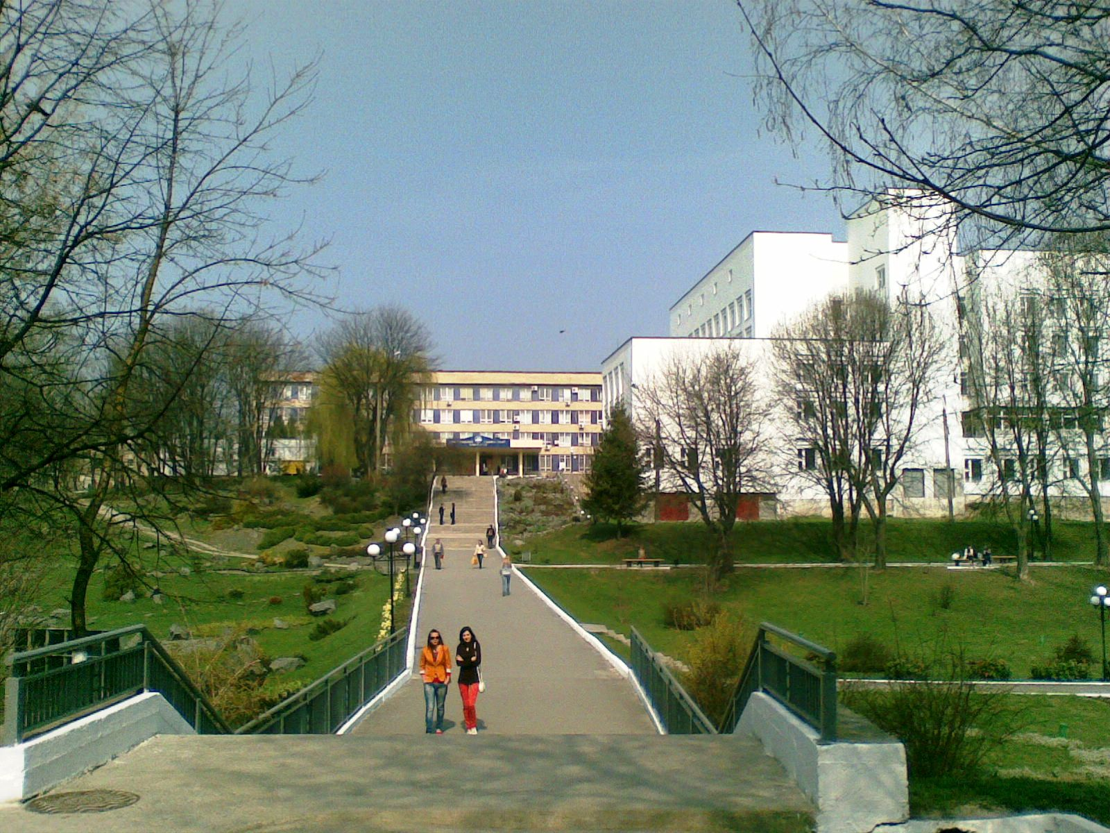 Центральна алея ботанічного саду Хмельницького національного університету